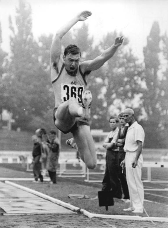 Joachim Kirst Zentralbild Koch 8.8.1968 Weltbeste Punktzahl im Zehnkampf - Erfurt: XIX.DDR-Meisterschaften in der Leichtathletik - Zehnkampf der Männer - Weitsprung - Kirst in Führung. Bei den Zehnkämpfern ging Joachim Kirst - hier beim Weitsprung - nach den fünf Disziplinen des ersten Tages, als Vertreter des ASK Vorwärts Potsdam, mit 4557 Punkten in Führung. Diese Punktzahl wurde bisher von keinem Zehnkämpfer der Welt nach 5 Kämpfen erreicht.